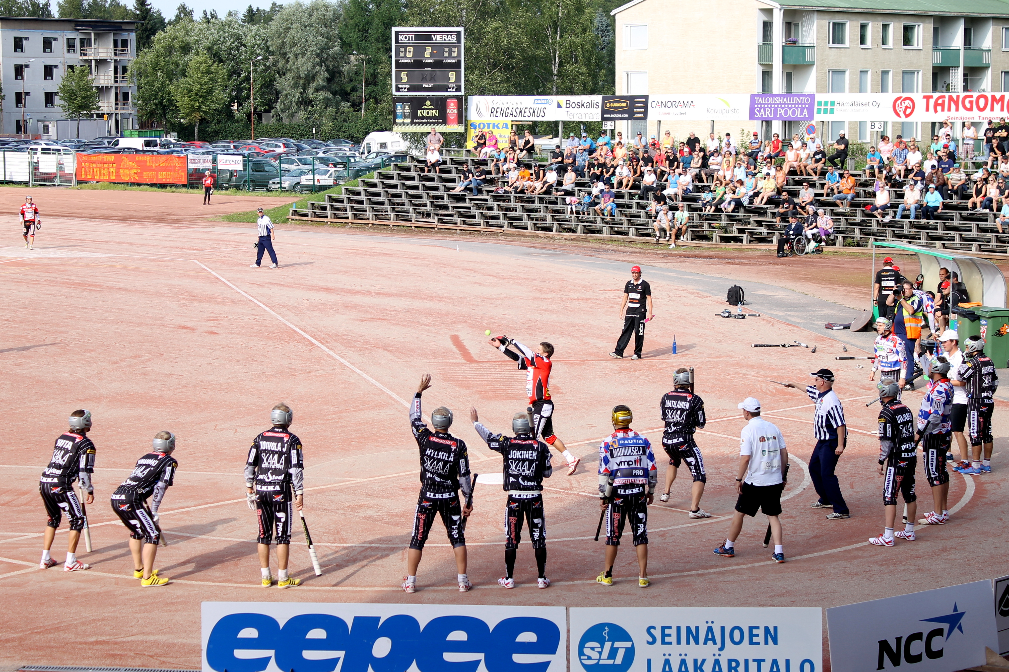 Jymyjussien kaari